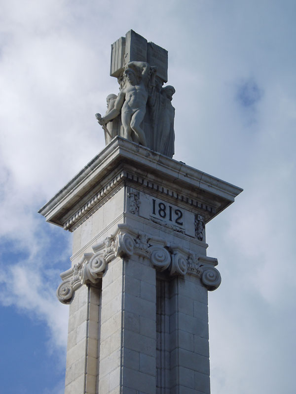 Detalle del Monumento a las Cortes de Cádiz (1912) que conmemora el primer centenario de la primera Constitución española. Cádiz, España.